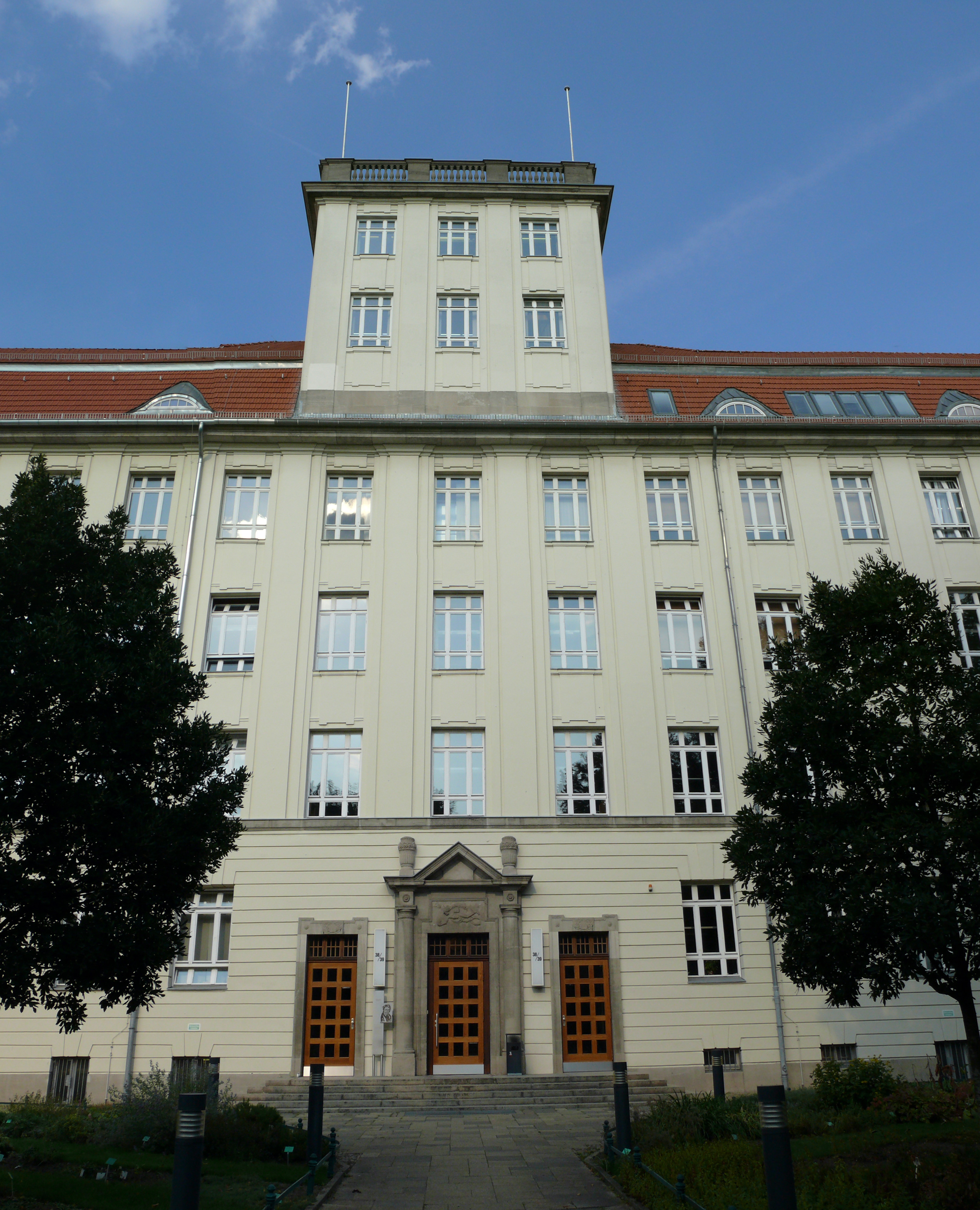 Berlin-Wedding Lütticher Straße Beuth Hochschule Hauptportal